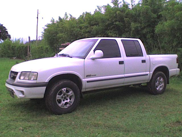 Chevrolet S-10, versión sudamericana.